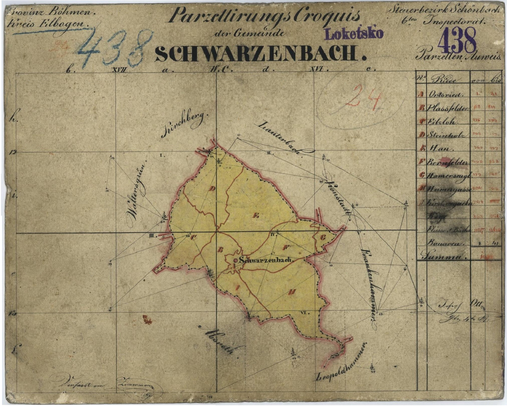 Parzellierungs-Croquis des Franziszeischen Katasters für das Dorf Schwarzenbach, Kreis Elbogen, Provinz Böhmen (heute Tschechien)